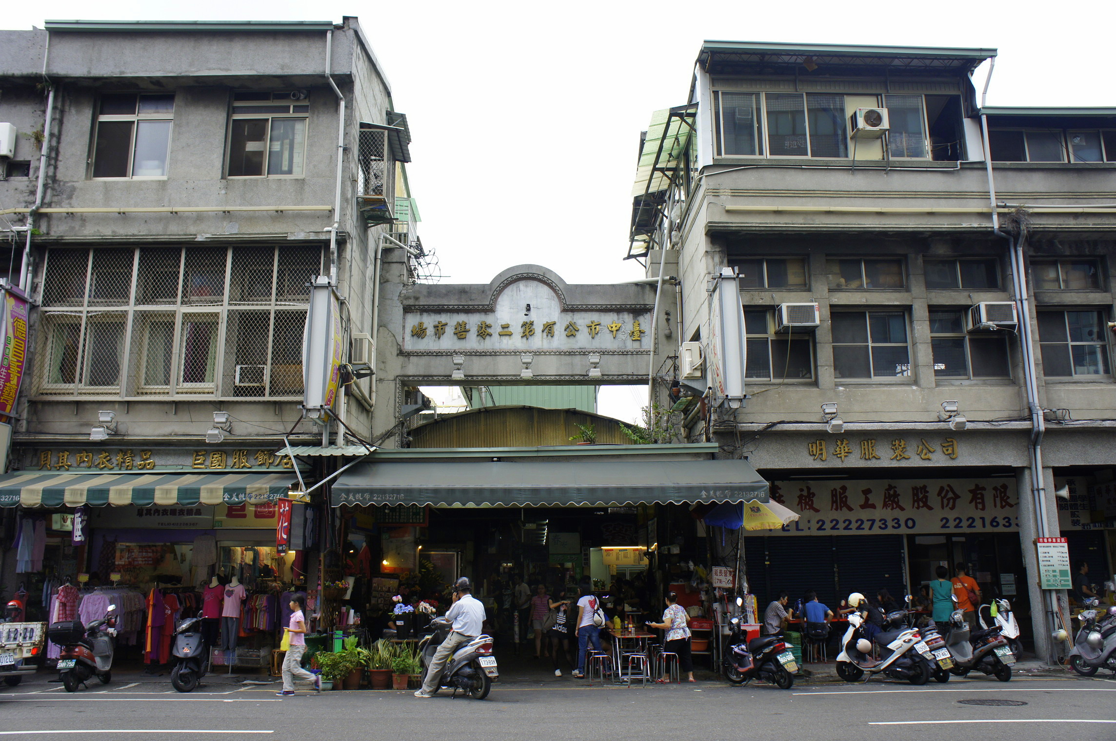 中文（台灣）: 臺中市中區第二市場。